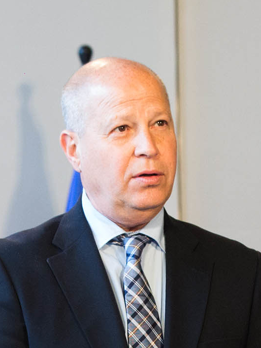 Francisco Javier Imbroda Ortiz, consejero de Educación y Deporte de la Junta de Andalucía el 22 de enero de 2019 el día de su toma de posesión.